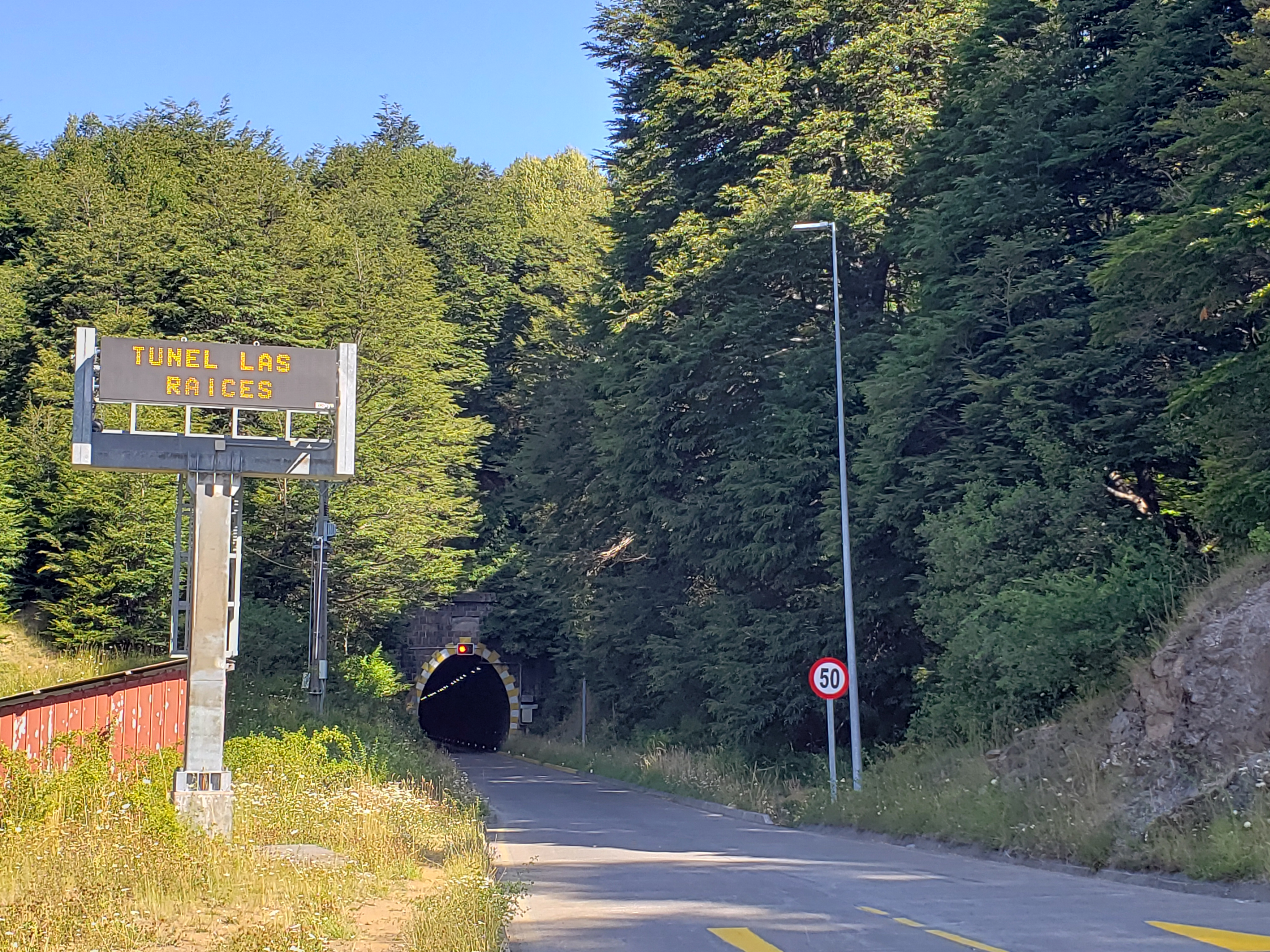 Entrada poniente del Túnel Las Raíces, Chile